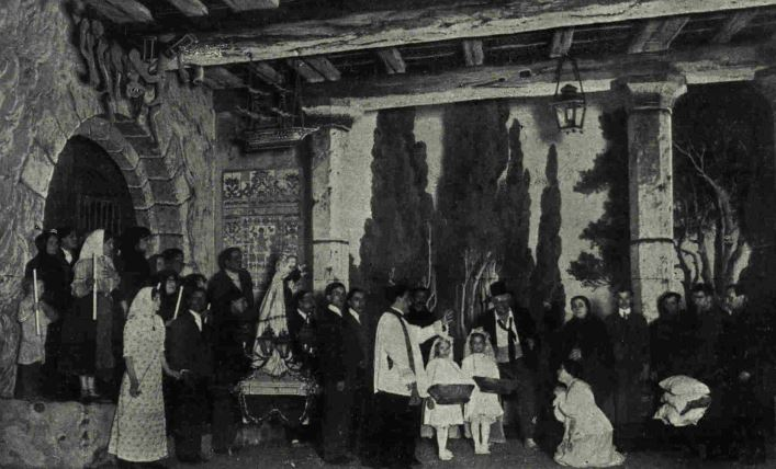 Escena final de l'obra La Verge del Mar (1912) de Santiago Rusiñol